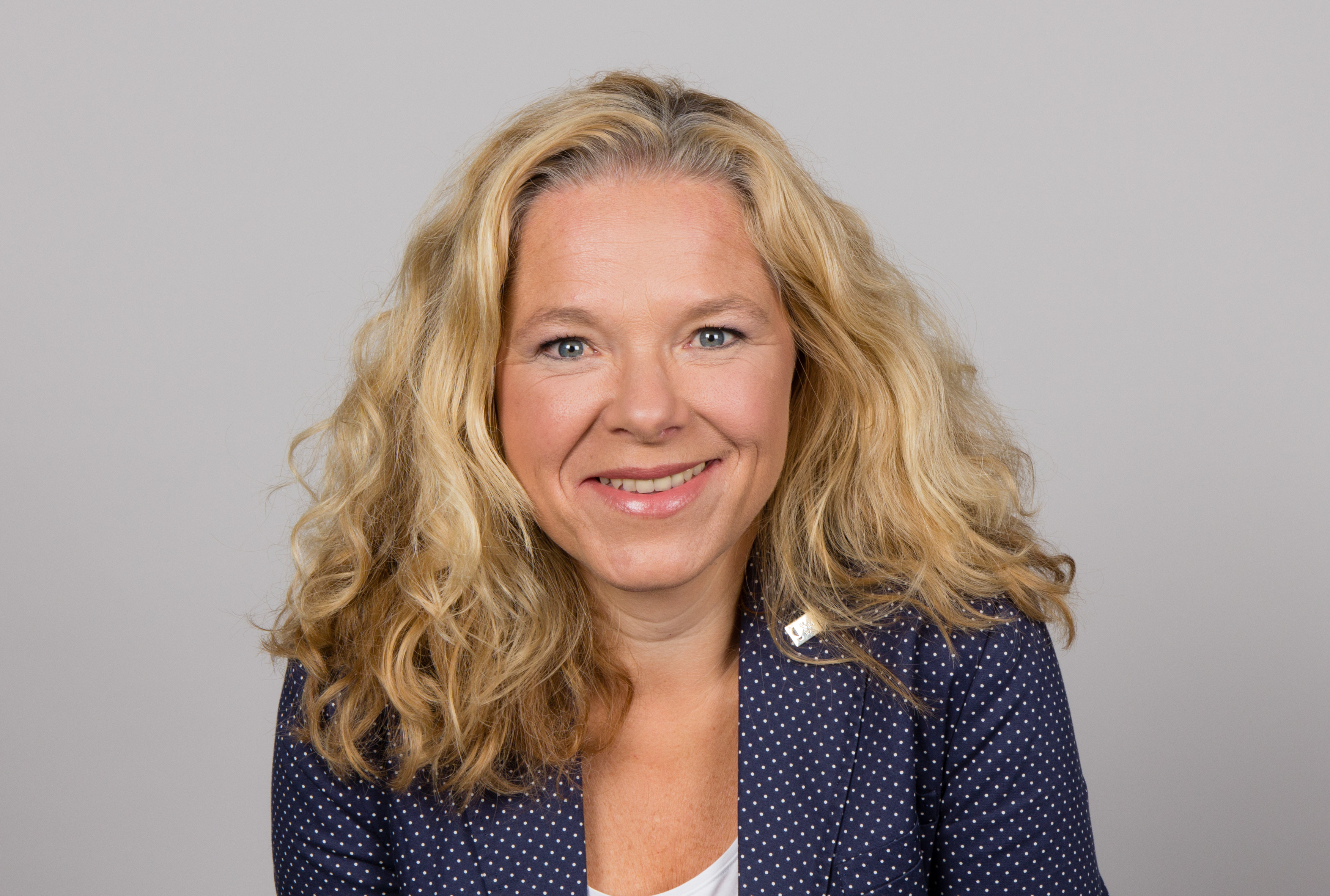 Doris Wagner (* 28. Januar 1963 in Bremen) ist eine deutsche Übersetzerin und gewählte Abgeordnete im Deutschen Bundestag (Bündnis 90/Die Grünen). Wikipedia-Bundestagsprojekt 2014 8–12 September 2014 in BerlinThis file was taken during the project “Wiki loves parliaments/Bundestag 2014” (German). Organisation: Martin Rulsch, Olaf KosinskyDesign: Martin KraftPhotography: Foto-AG Gymnasium Melle (Jan-Kristof Blömke, Lukas Eismann, Moritz Kosinsky, Laura Lessing, Karsten Mosebach, Mascha Mosebach, Teresa Schreer, Noah Sewöster, Niklas Tschöpe), Olaf Kosinsky, Martin Kraft, Harald Krichel, Steffen Prößdorf, Ralf Roletschek, Martin Rulsch, Gerd Seidel, Sven TeschkeVideo: Marc Rudnick, Manuel SchneiderEditors: Marcus Cyron, Günter Fremuth, Martin Kraft, Robin Krahl, Harald Krichel, Martin Rulsch, WikiAnikaReception: DasMonstaaa, Leonie Rabea Große, Lutheraner, Nina Möllering, Martin Rulsch, WikiAnika, Foto-AG Gymnasium MelleCosmetics: Regina Bosak, Bettina Dieguez, Sandra Kobbe, Andrea Strehlke; Irada Abdullayeva, Vivien Abelmann, Olena Engelbrecht, Sarah Fabini, Nina Magnus, Jacqueline Schmidt, Leonie Taboada, Julia Willer Usage information If you need more information how to use this file, please send an email to . Personality rights warningAlthough this work is freely licensed or in the public domain, the person(s) shown may have rights that legally restrict certain re-uses unless those depicted consent to such uses. In these cases, a model release or other evidence of consent could protect you from infringement claims.